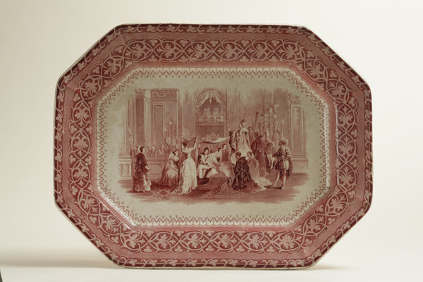 Fuente. Spanish Marriages, Madrid. Fuente conmemorativa de las bodas de Isabel II y su hermana.